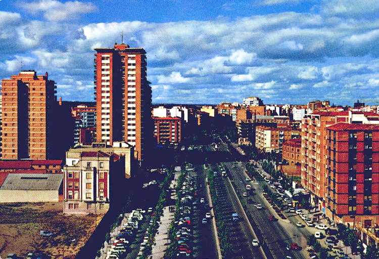 Paseo Zorrilla - Valladolid - Ediciones Arribas - Zaragoza. 2072 Valladolid. Paseo de Zorrilla. Edificio de las Mercedes y en primer término antigua Clínica del Rosario. - Tarjeta postal. Papel 150 x 105 mm Color